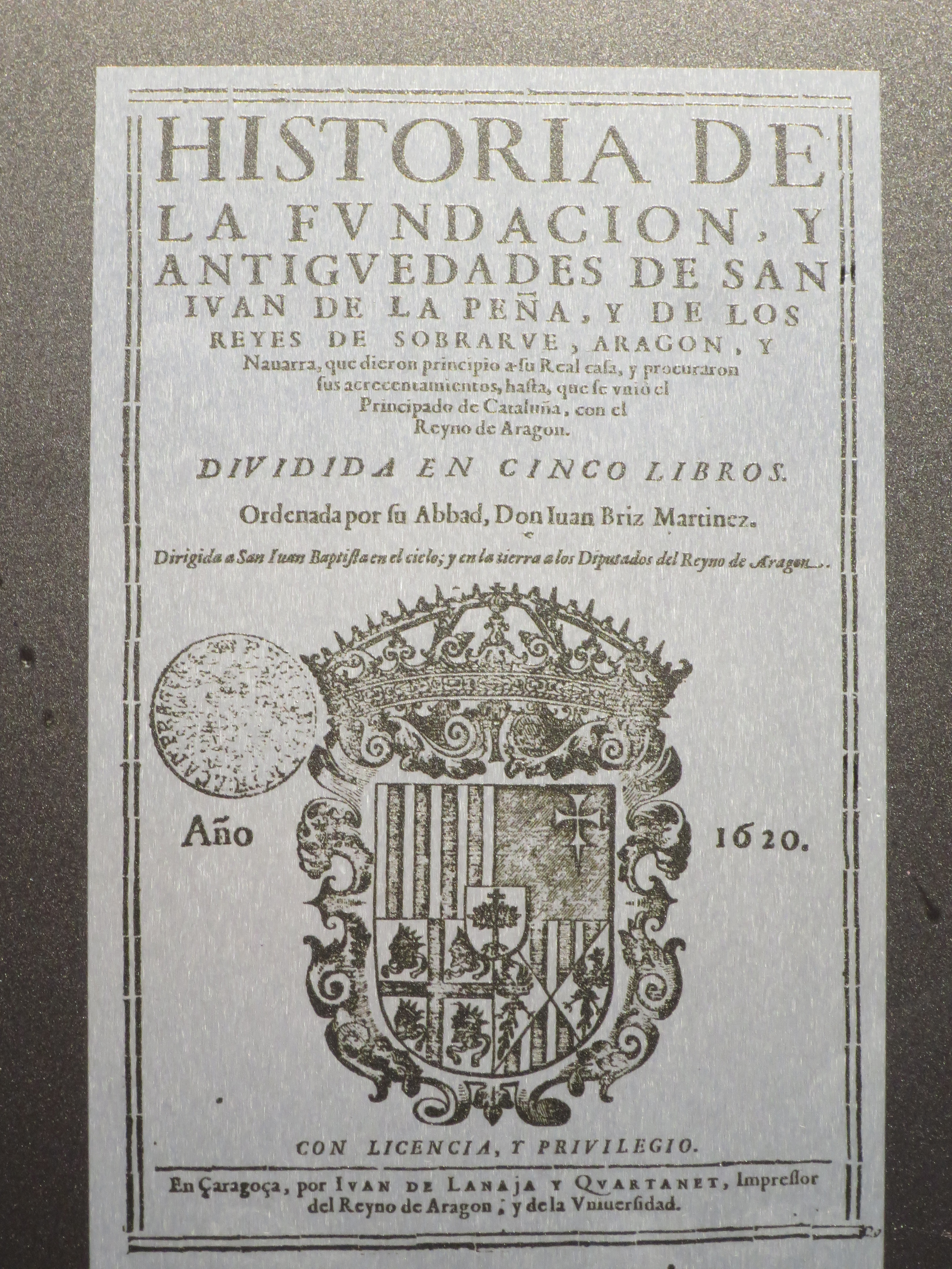 Juan Briz Martinez, Historia de la Fundacion, y antiguedades de San Juan de la Peña, y de los Reyes de Sobrarve, Aragon, y Navarra, que dieron principio a su Real casa, y procuraron sus acrecentamientos, hasta, que se uniô el Principado de Cataluña, con el Reyno de Aragon. 5 Bde. 1620